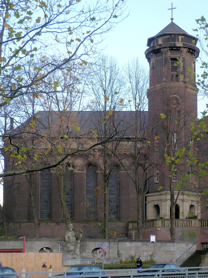 Altkatholische Friedenskirche in Essen-Mitte